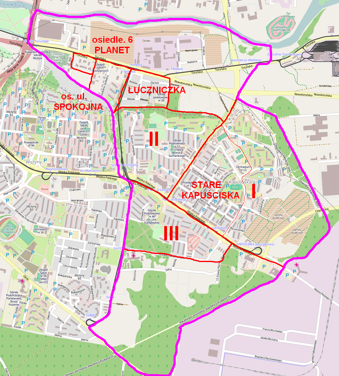 Mapa osiedla Kapuściska w Bydgoszczy w podziale na sektory